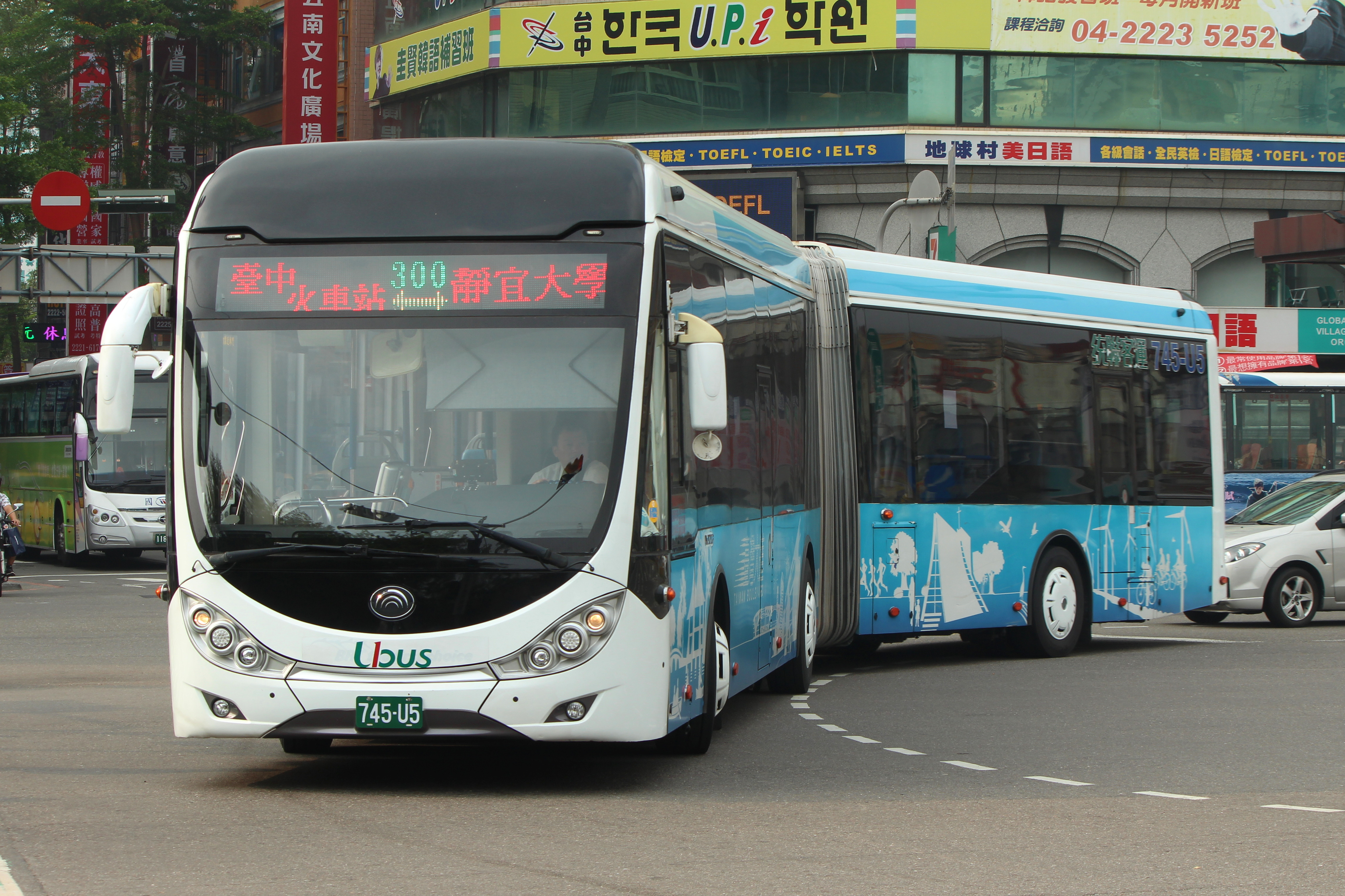 300 台中火車站